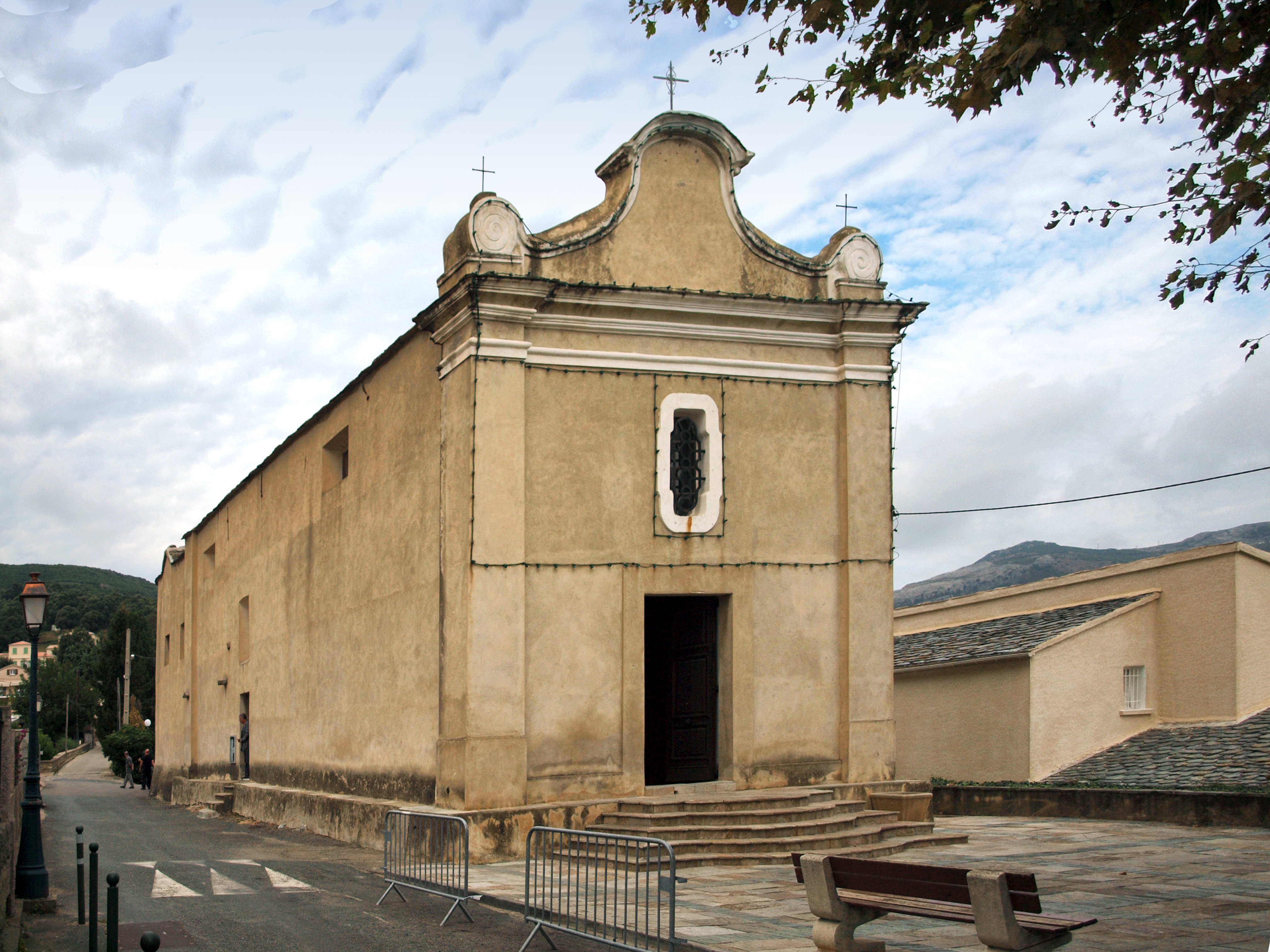 Furiani, Bastia (Haute-Corse) - L'église Saint-Jean-Baptiste, datée de la fin du XVIe siècle, était la chapelle de confrérie Santa Croce avant de devenir église paroissiale au XVIIIe siècle.